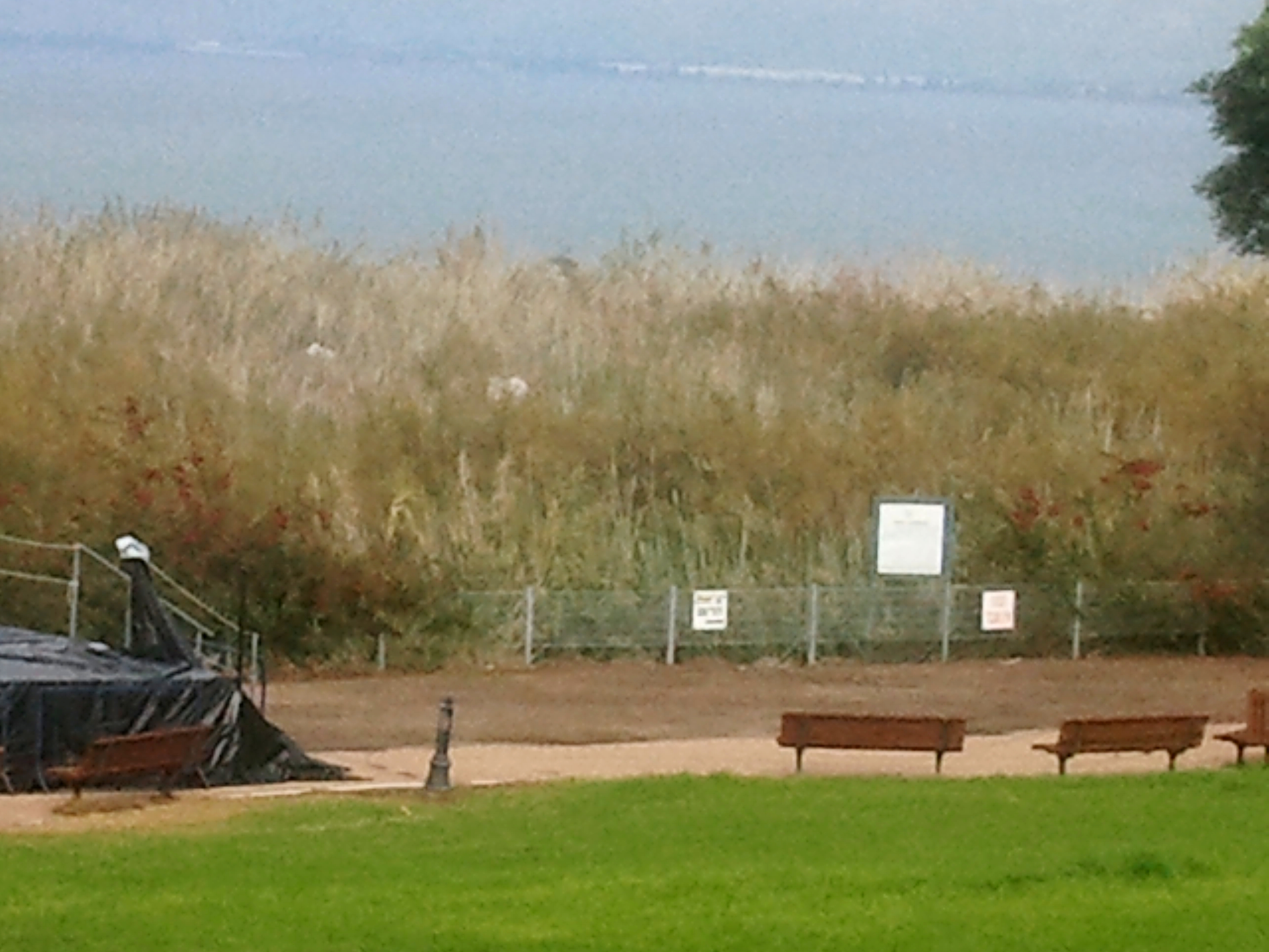 מזרקות מי הירמוך - מול בית גבריאל בתוך הכנרת בתוך סבך הצמחייה פורצים החוצה "מזרקות מי הירמוך". אלה מים המועברים מנהר הירמוך לכנרת בצינורות במסגרת הסכם השלום עם ירדן. על פי ההסכמים, ישראל זכאית ל-25 מיליון מטר מעוקב בשנה. מים אלה משמשים להשקיית אדמות עמק הירדן ועמק בית שאן.